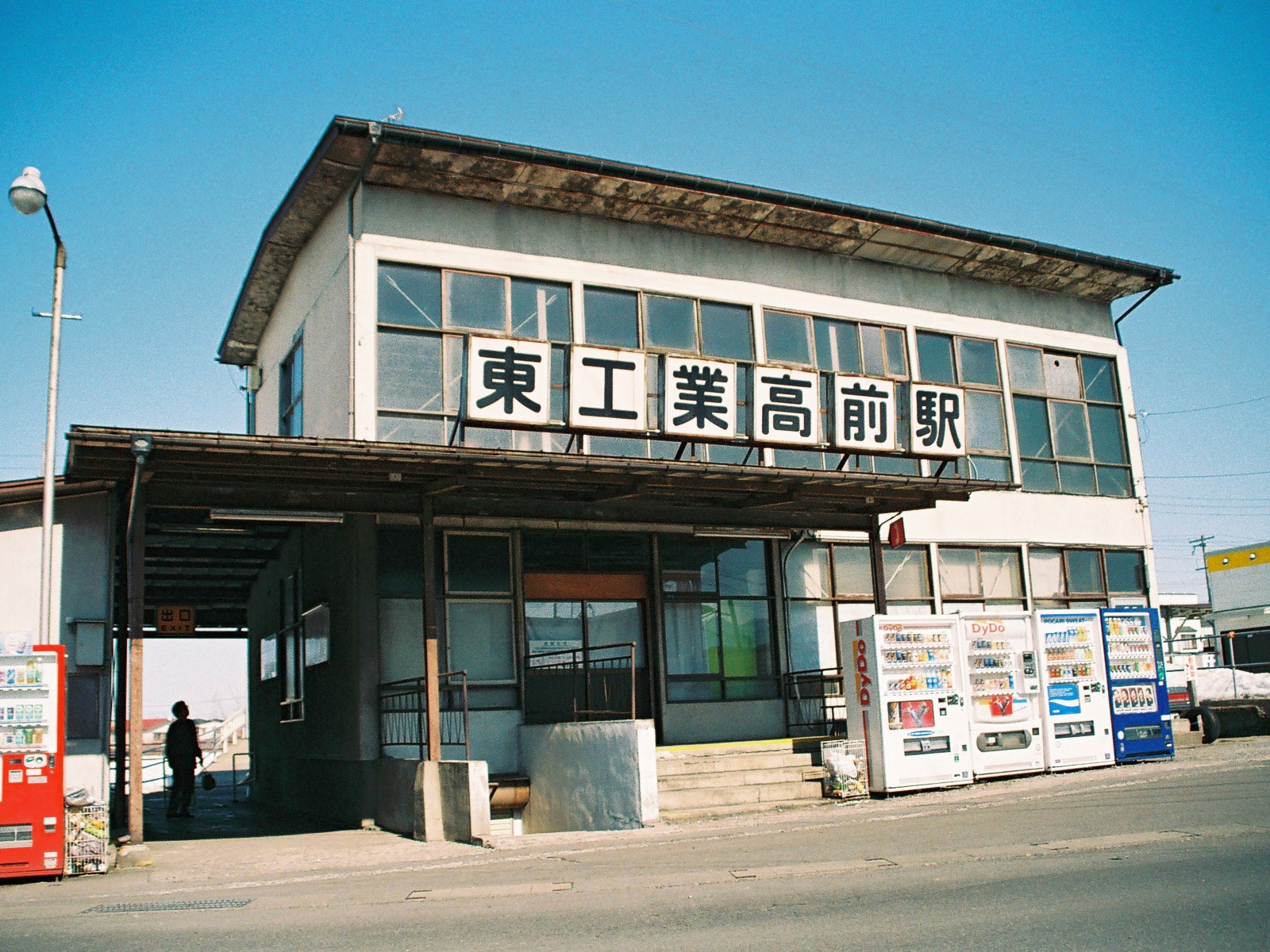 Hirosaki Higashikōmae Station, on the Kōnan Railway Kōnan Line, Hirosaki, Aomori 弘前東高前駅